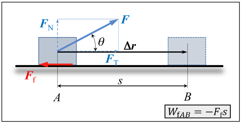 Objektuaren eta zoluren arteko marruskadura-indarrak eginiko lanaren eskema grafikoa.